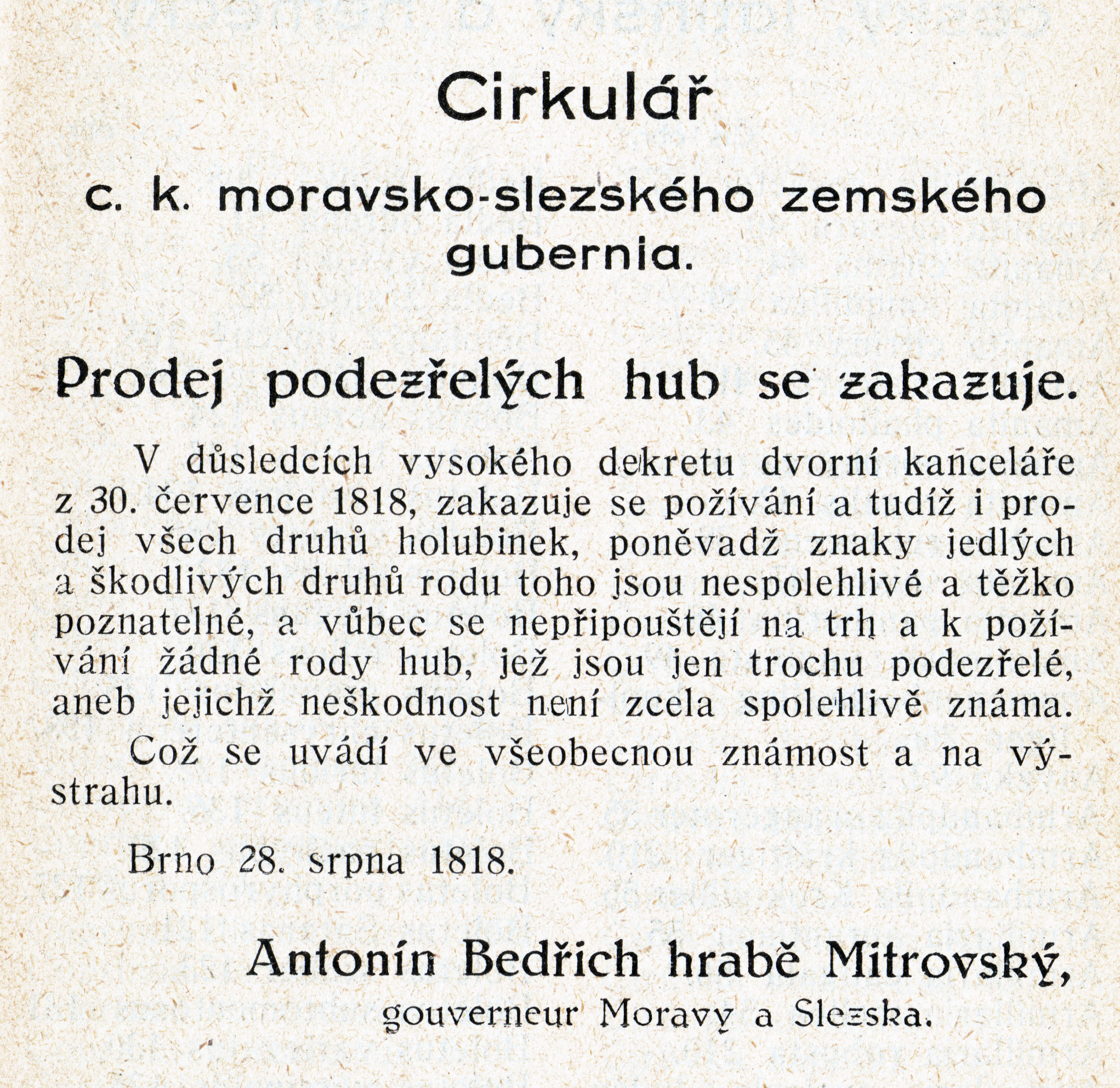 Cirkulář hraběte Mitrovského o zákazu prodeje podezřelých a zaměnitelných hub.